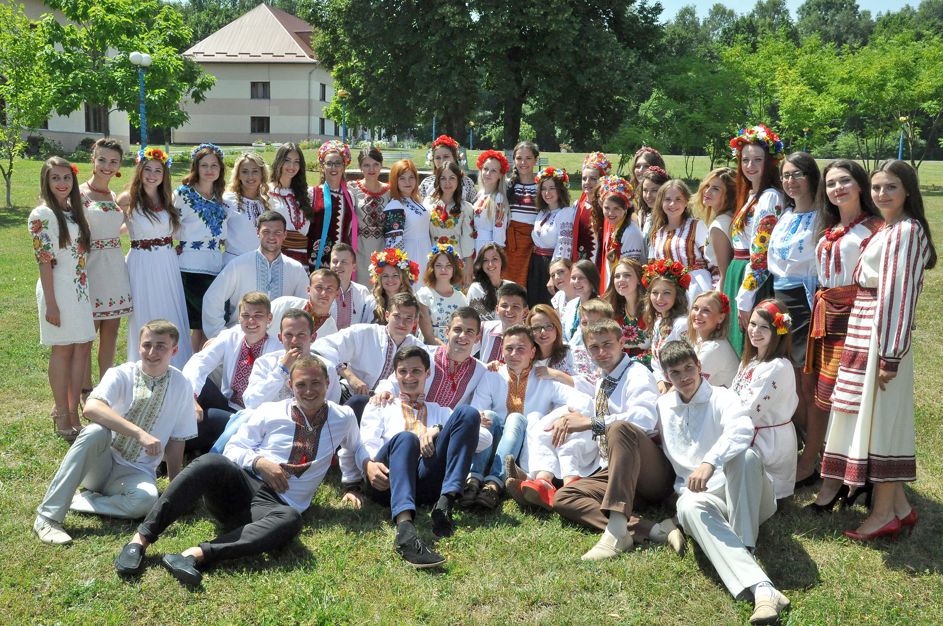 X Літні міжнародні студентські школи в НОК «Червона калина» Тернопільського державного медичного університету імені І. Я. Горбачевського.